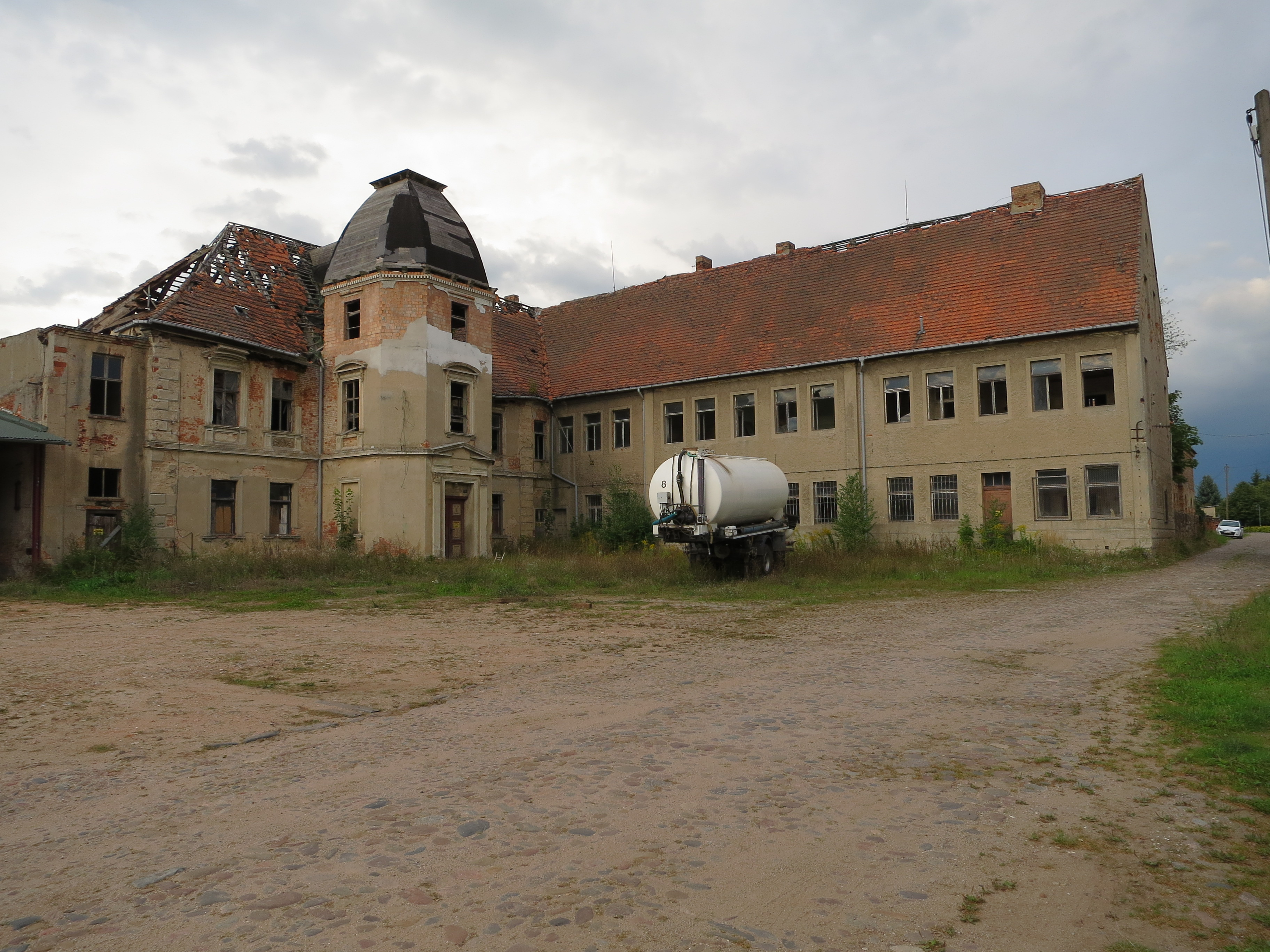 Das Rittergut - Schloss genannt - liegt in der Wiesenstraße von Dobritz, Zerbst-Anhalt und ist sehr renovierungsbedürftig. Dobritz ist ein Ortsteil von Zerbst/Anhalt in Sachsen-Anhalt.